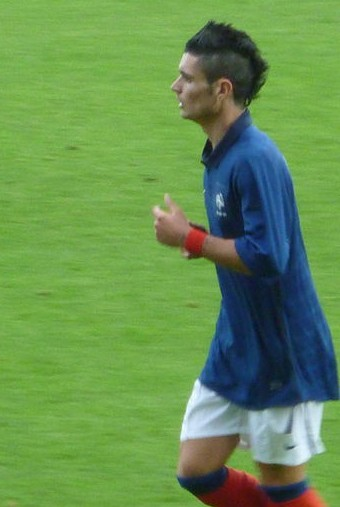 Rémi Cabella avec les U21 (photo retaillée d'après la photo originale de Julien).